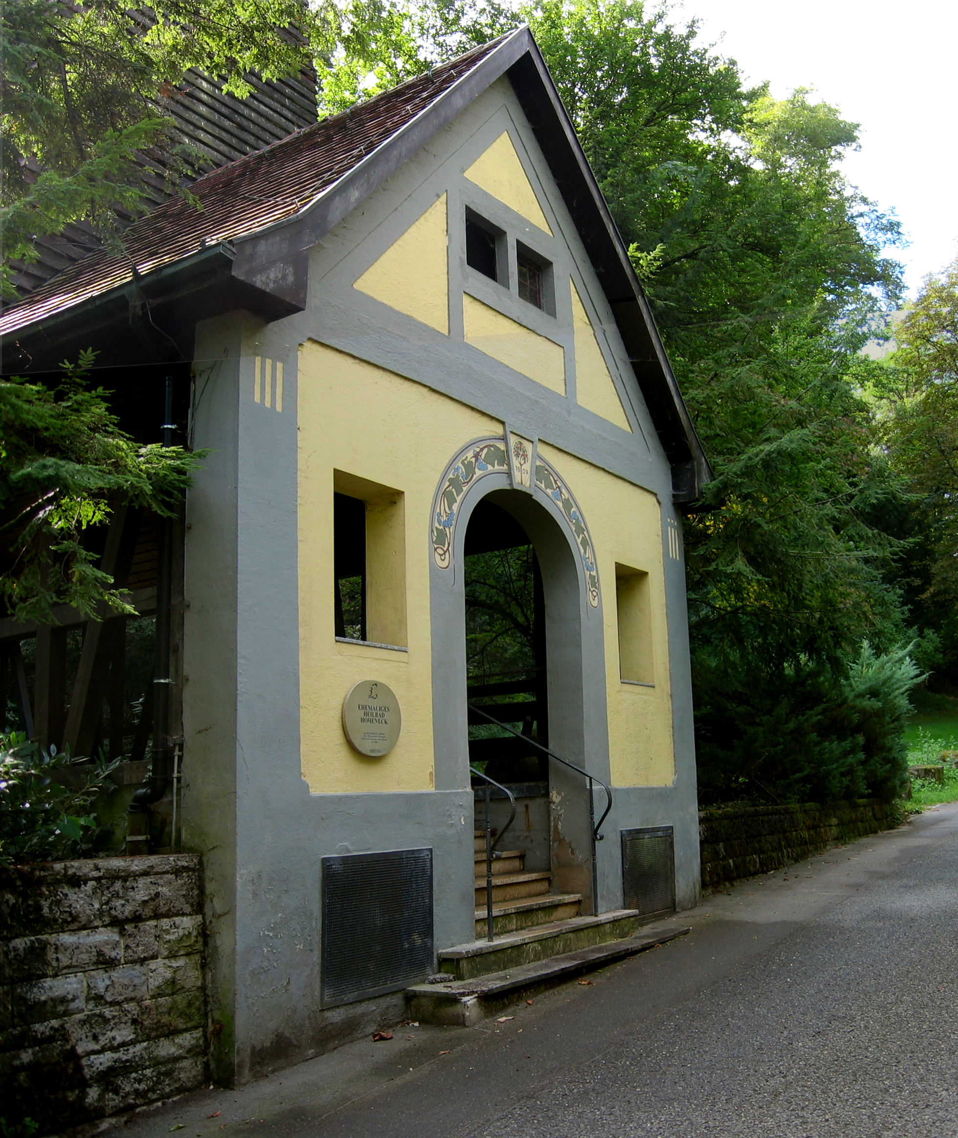 Ehemaliges Heilbad Ludwigsburg Hoheneck (Jahr 2015 HDR, Panoramabild)